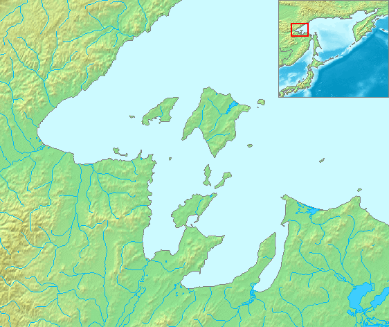 Shantar Islands/Шантарские острова